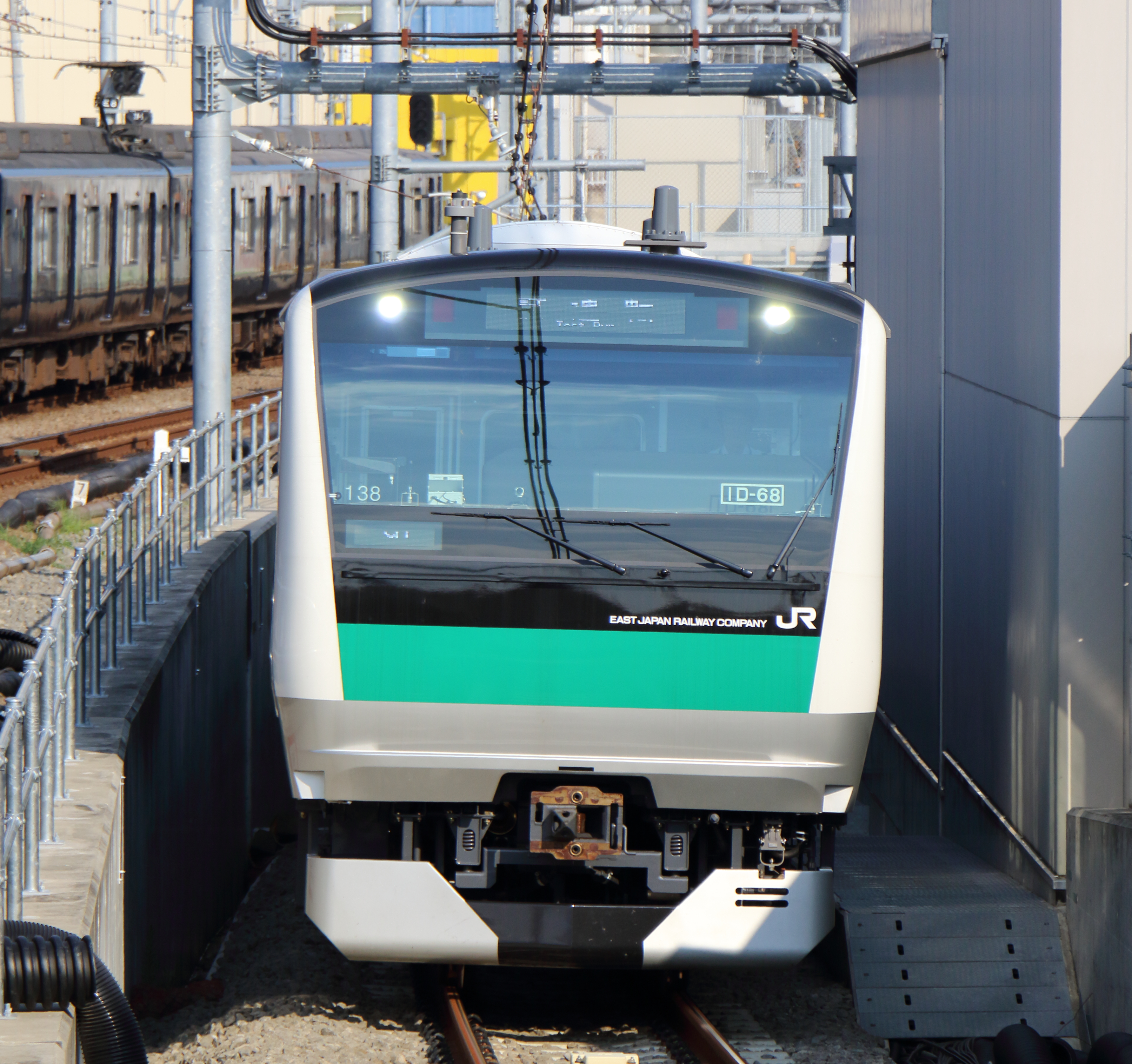 西谷駅に入線する相鉄新横浜線で試運転を行うE233系7000番台電車